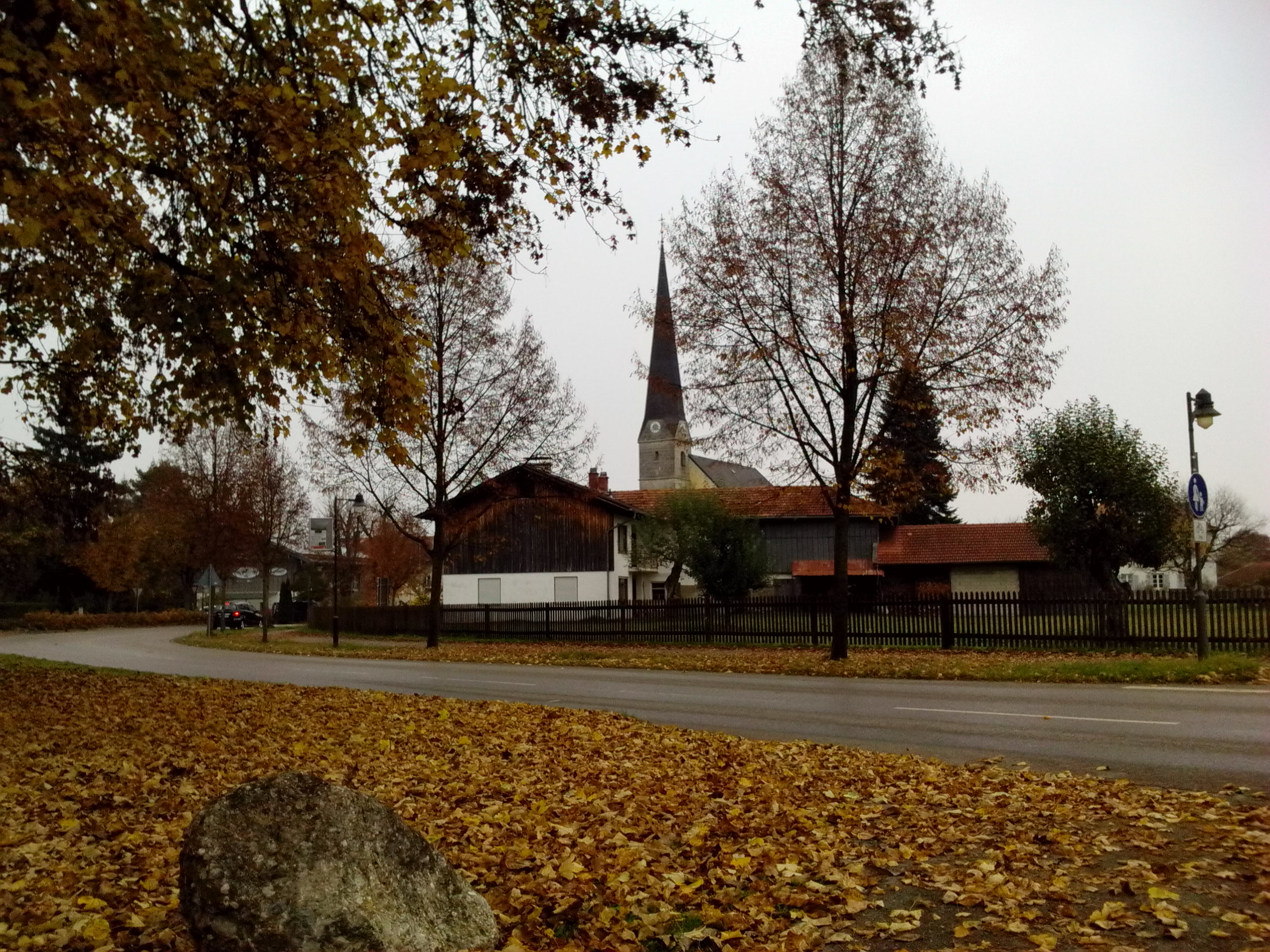 Aragonés: Kirchanschöring, Bavera